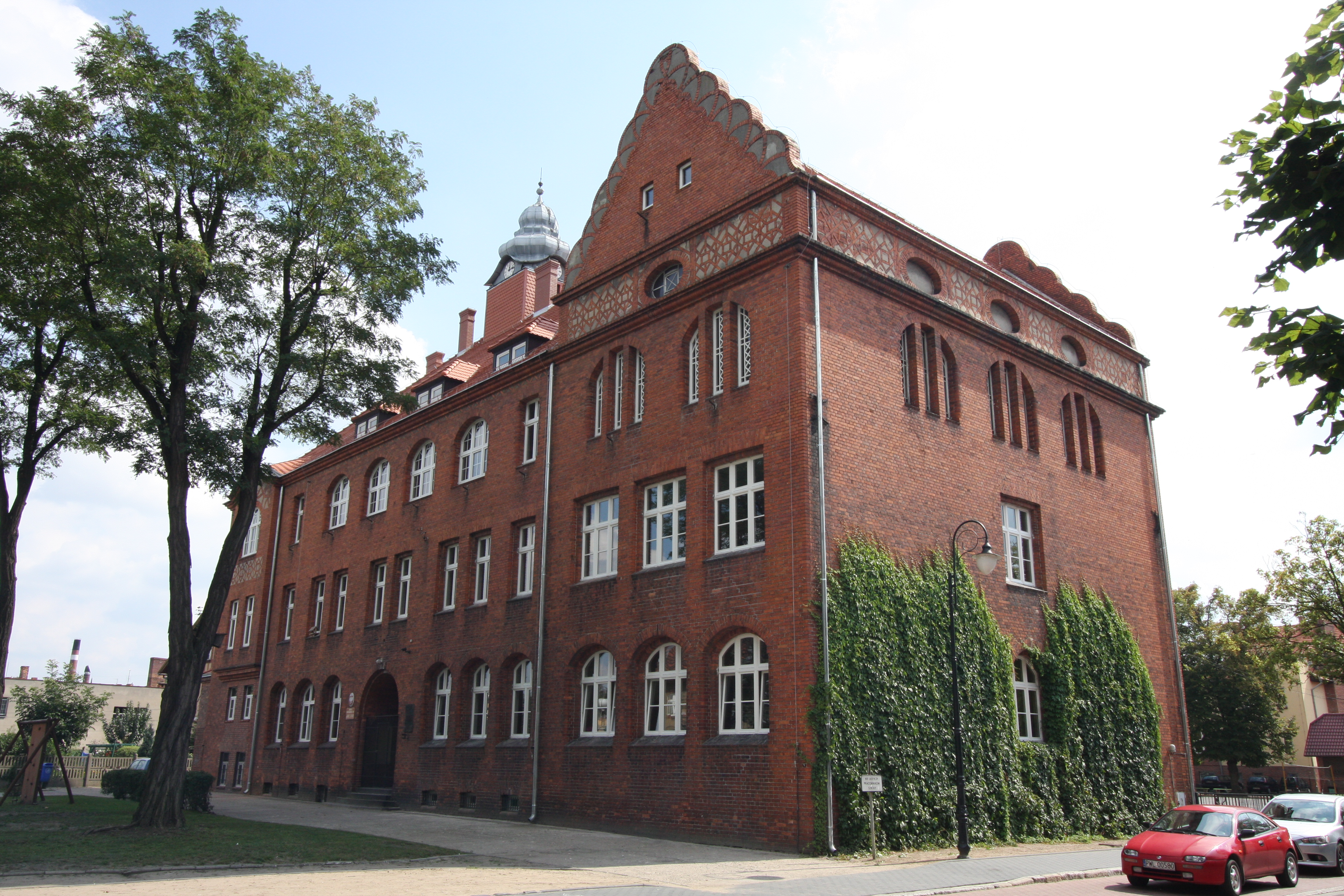 Wolsztyn, budynek szkolny, w zespole progimnazjum realnego, ob. szkoły podstawowej, mur., 1908, ul. Poniatowskiego 1